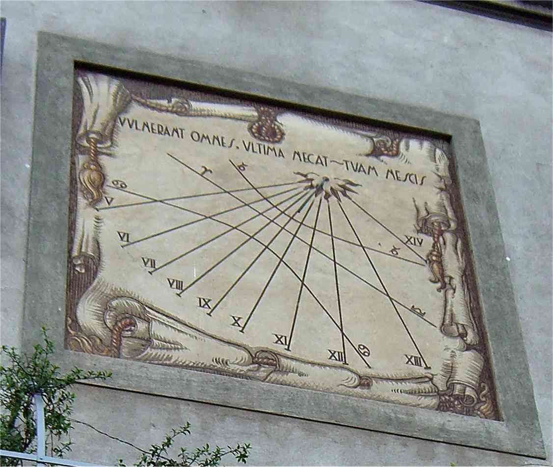 Lovere BG meridiana dipinta